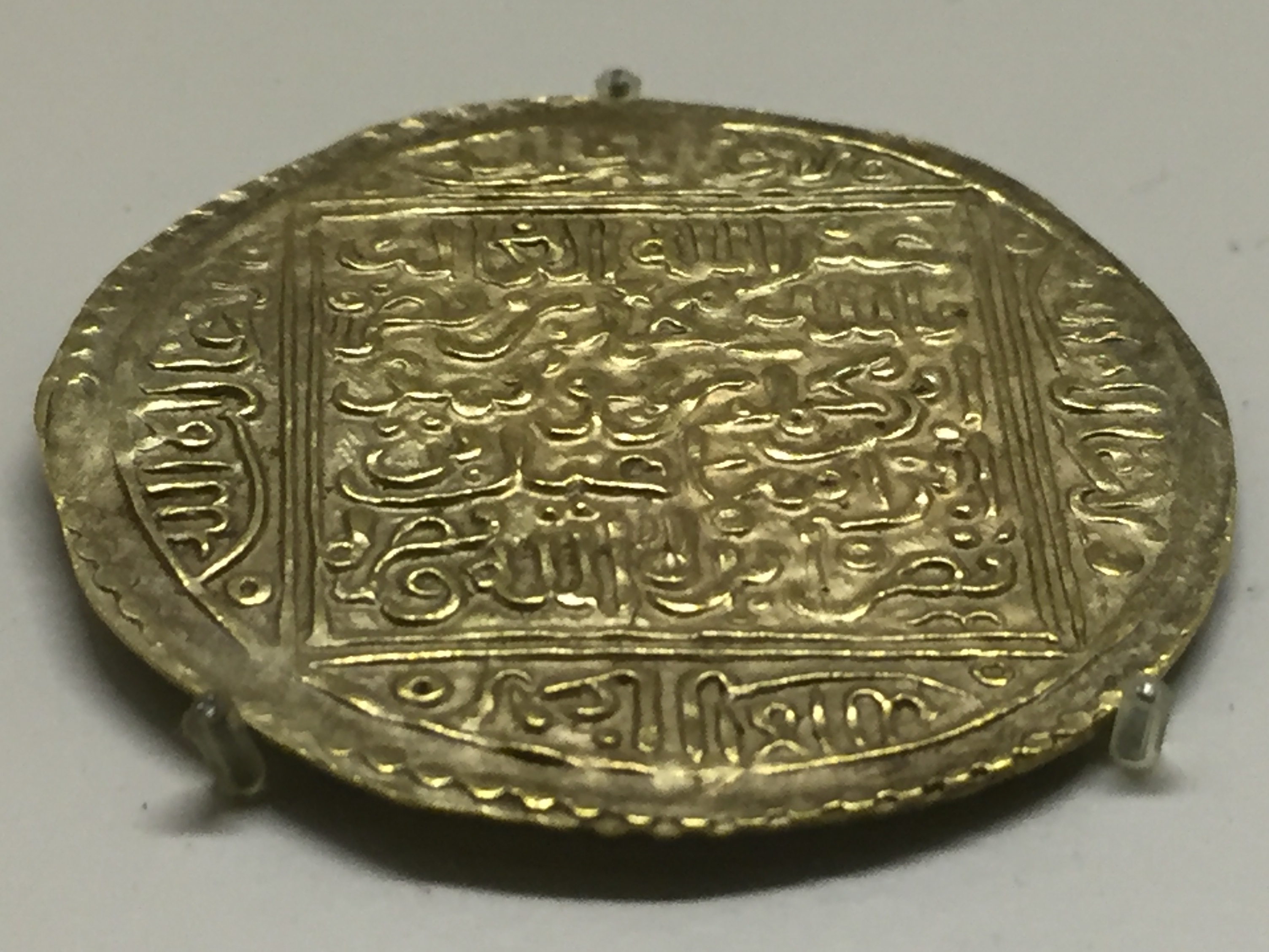 Dobla de oro del rey Muhammad IX, acuñada en Granada entre el 822 y 825 de la Hégira (1419-1431 después de Cristo) , en el Museo Arqueológico Nacional de Madrid.